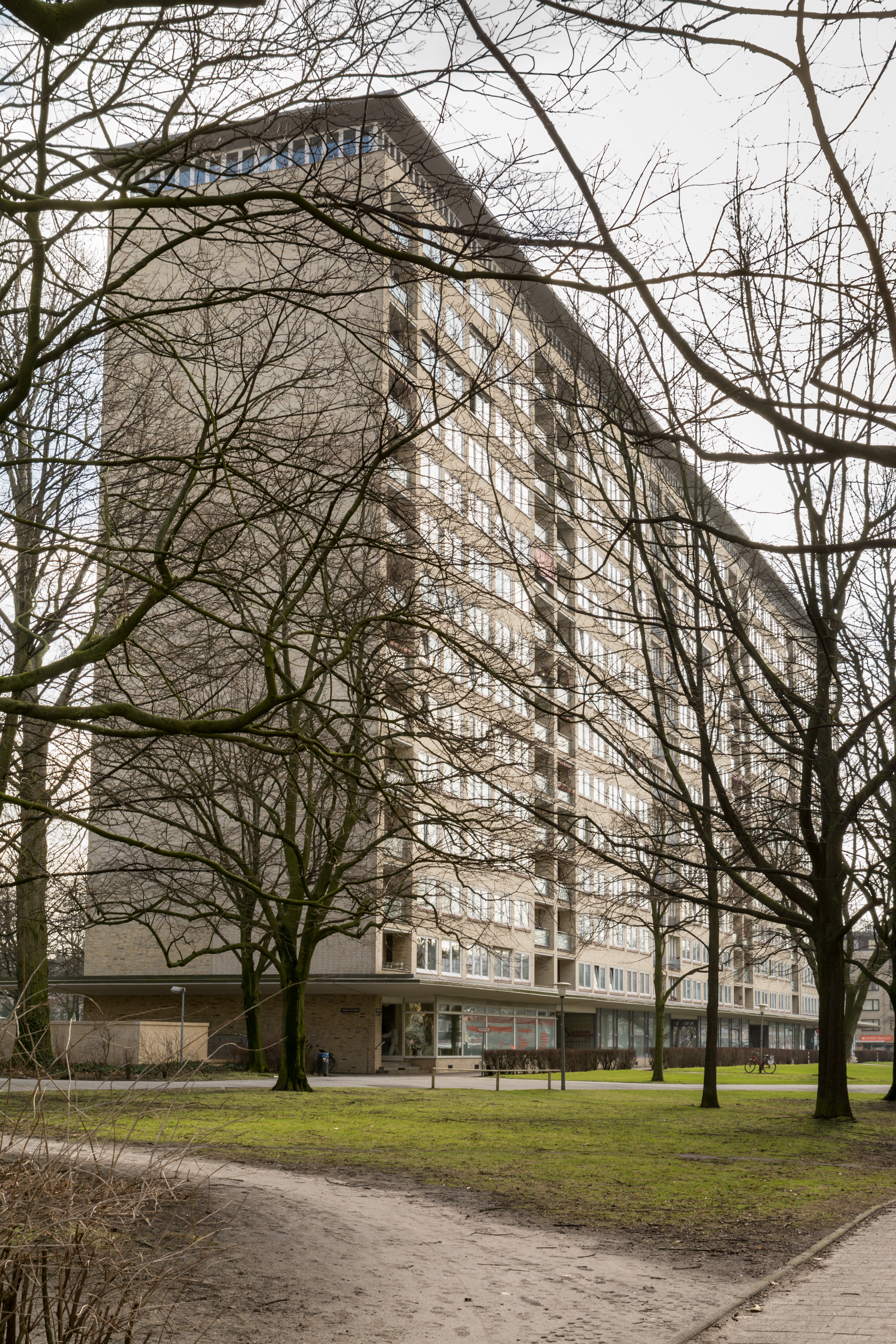 Mehrfamilienhaus Hallerstraße 1a-d in Hamburg-Harvestehude. This is a photograph of an architectural monument.